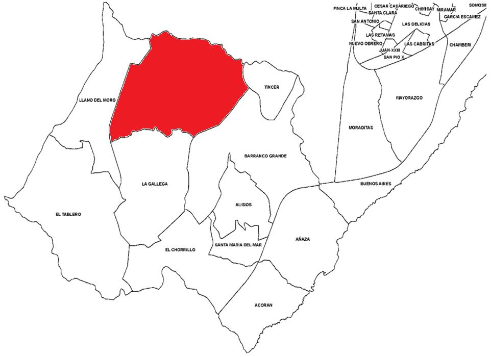 Localización del Sobradillo dentro del distrito Suroeste